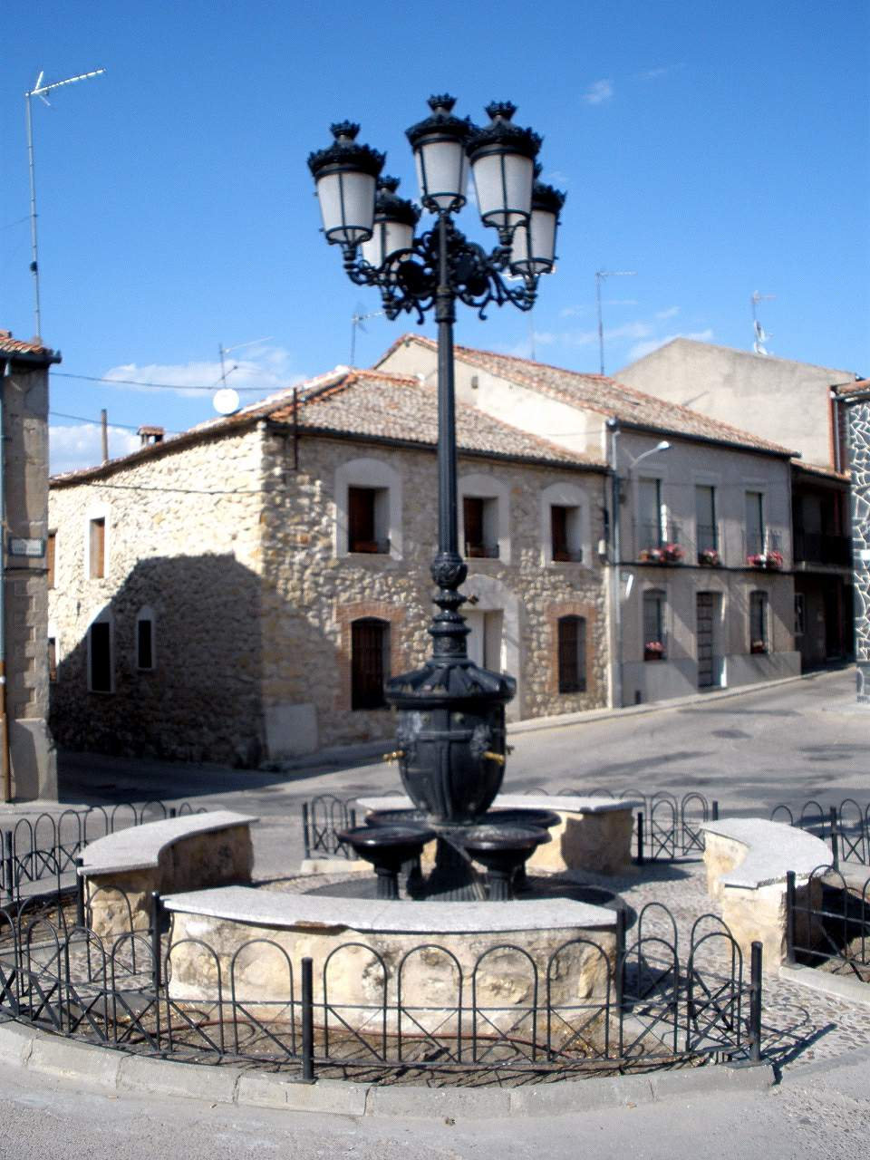 Fuente en Carbonero el Mayor (provincia de Segovia).